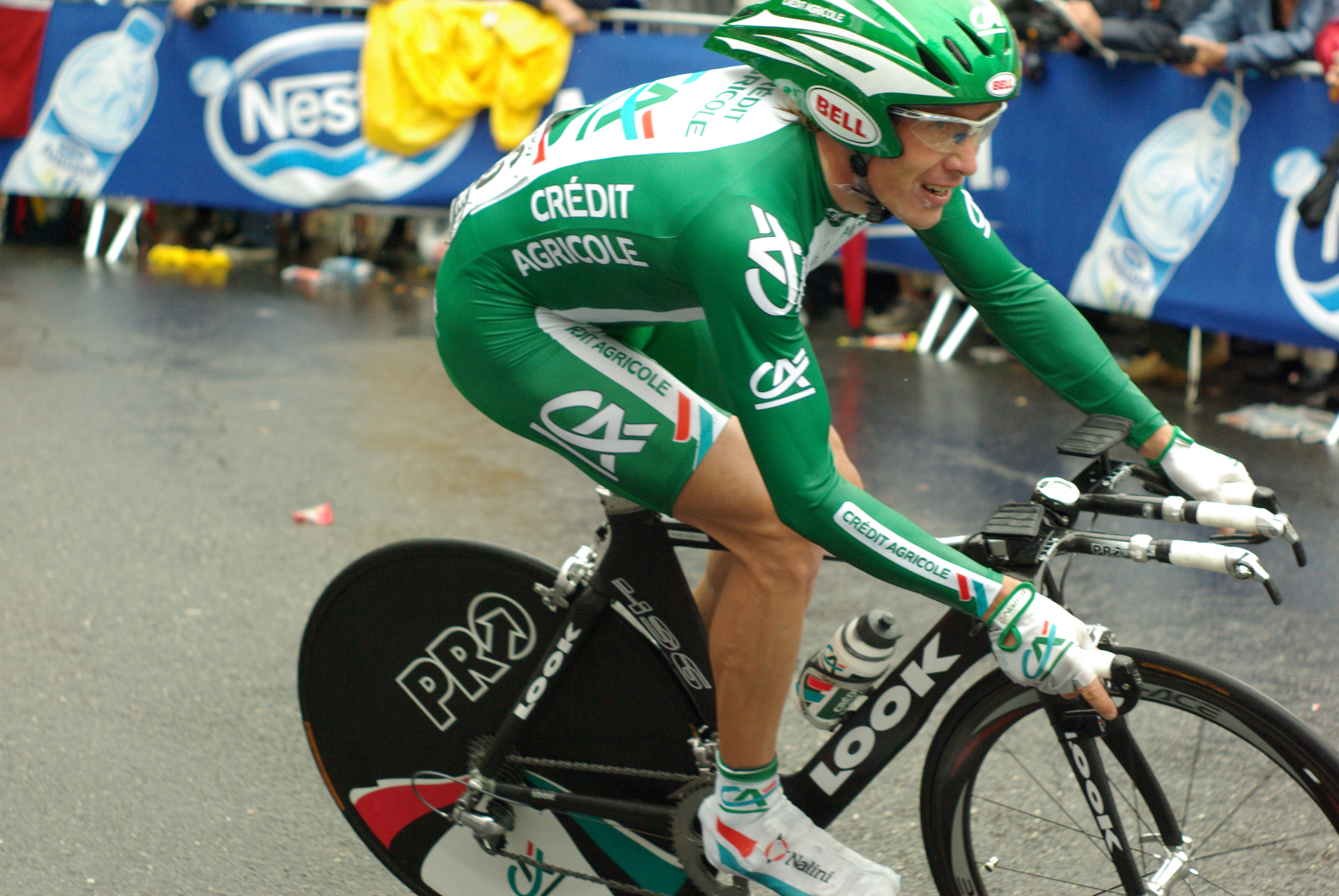 Dmitri Fofonov (Tour de France 2007)